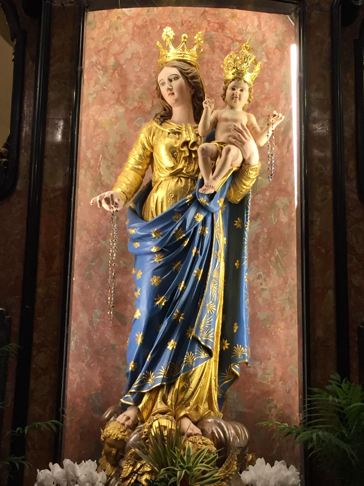 Statua della madonna a Bsiano